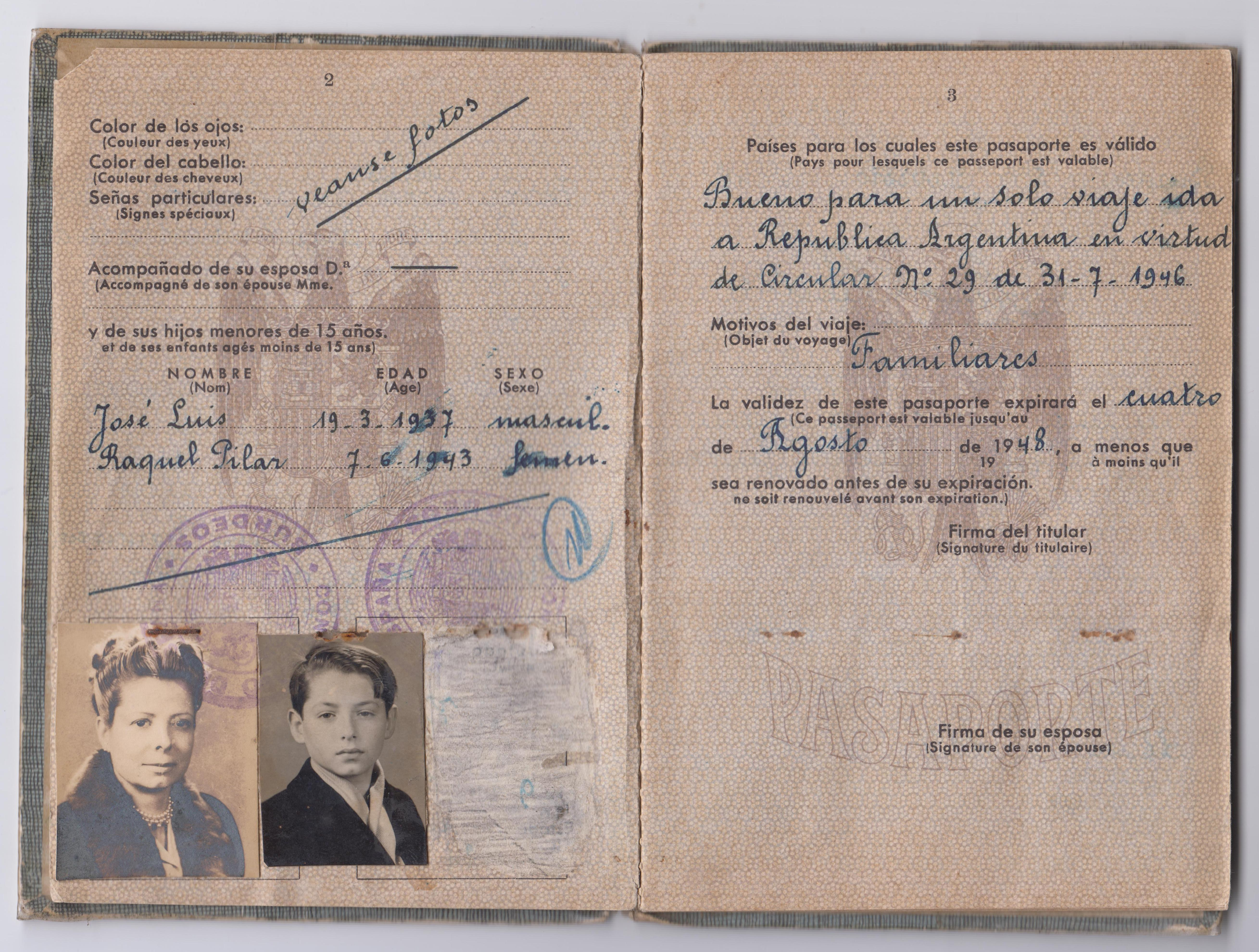 Pasaporte de un exiliado español emitido en 1948 por el consultado de Burdeos, Francia.